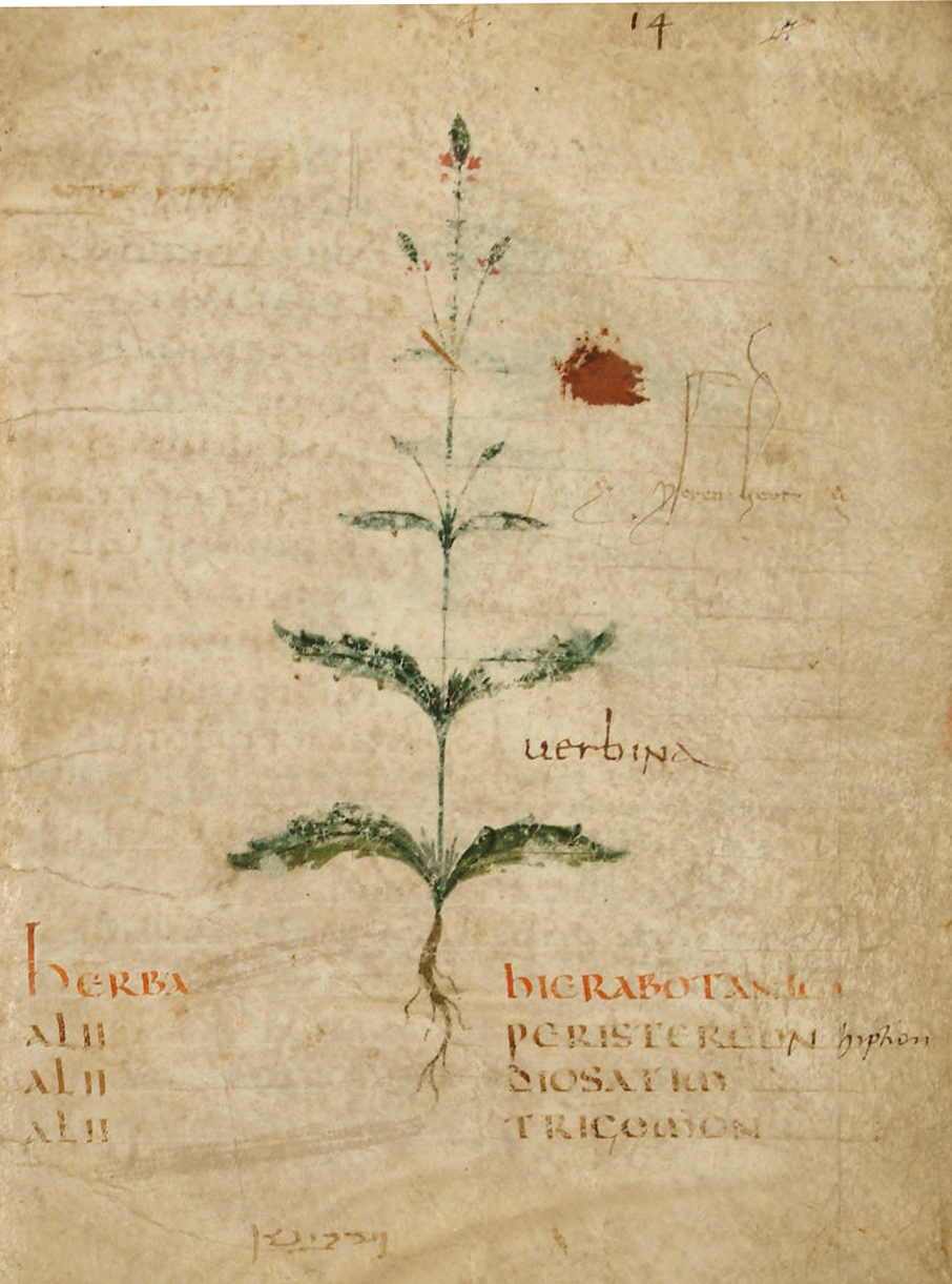 Abbildung von Verbenaca